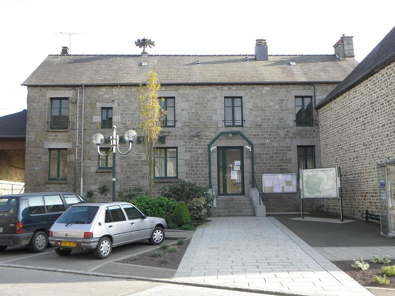 Mairie de La Bazouge-du-Désert (35).